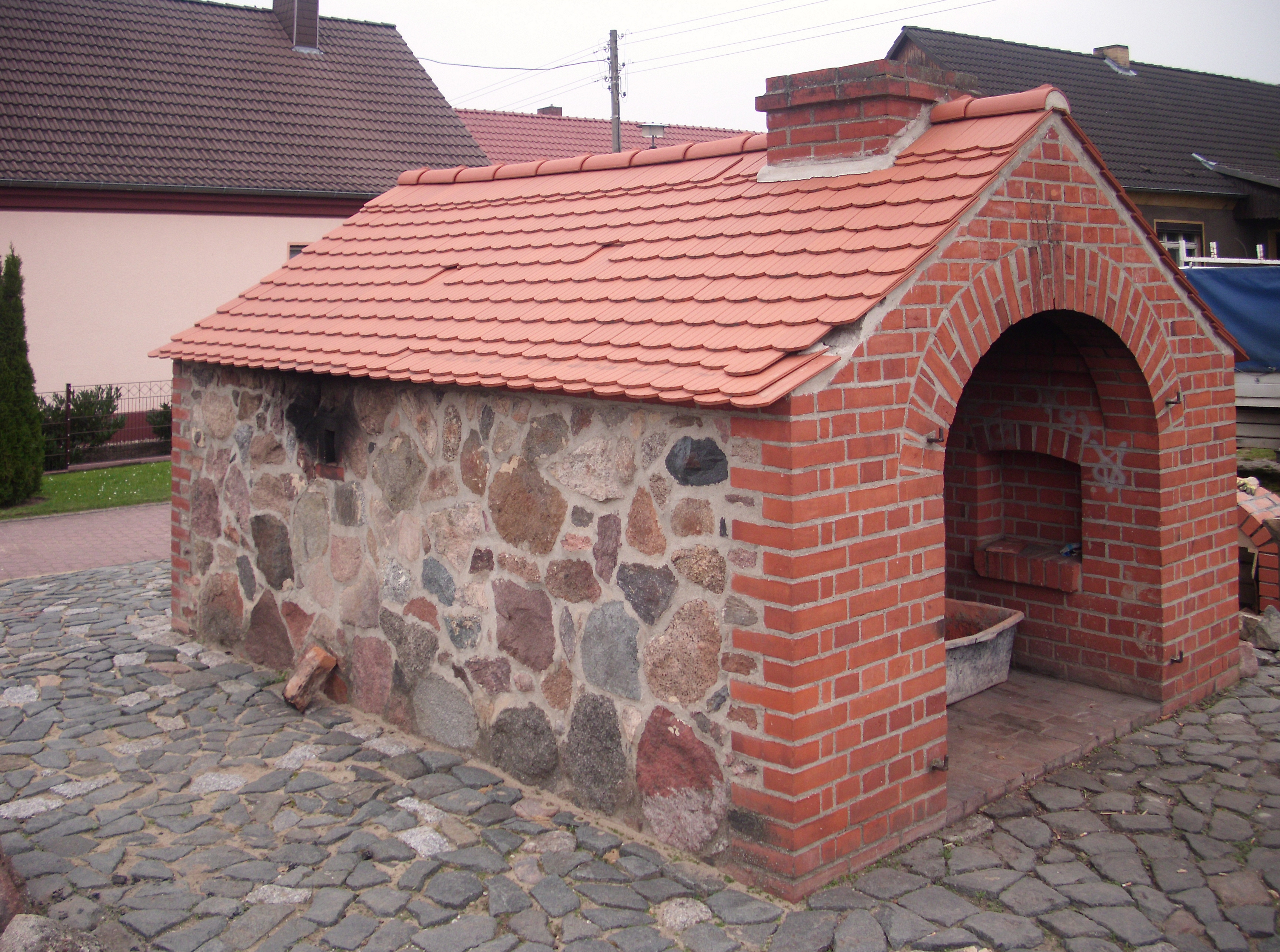 Backofenneubau auf dem Dorfanger Schernsdorf, Siehdichum, Brandenburg